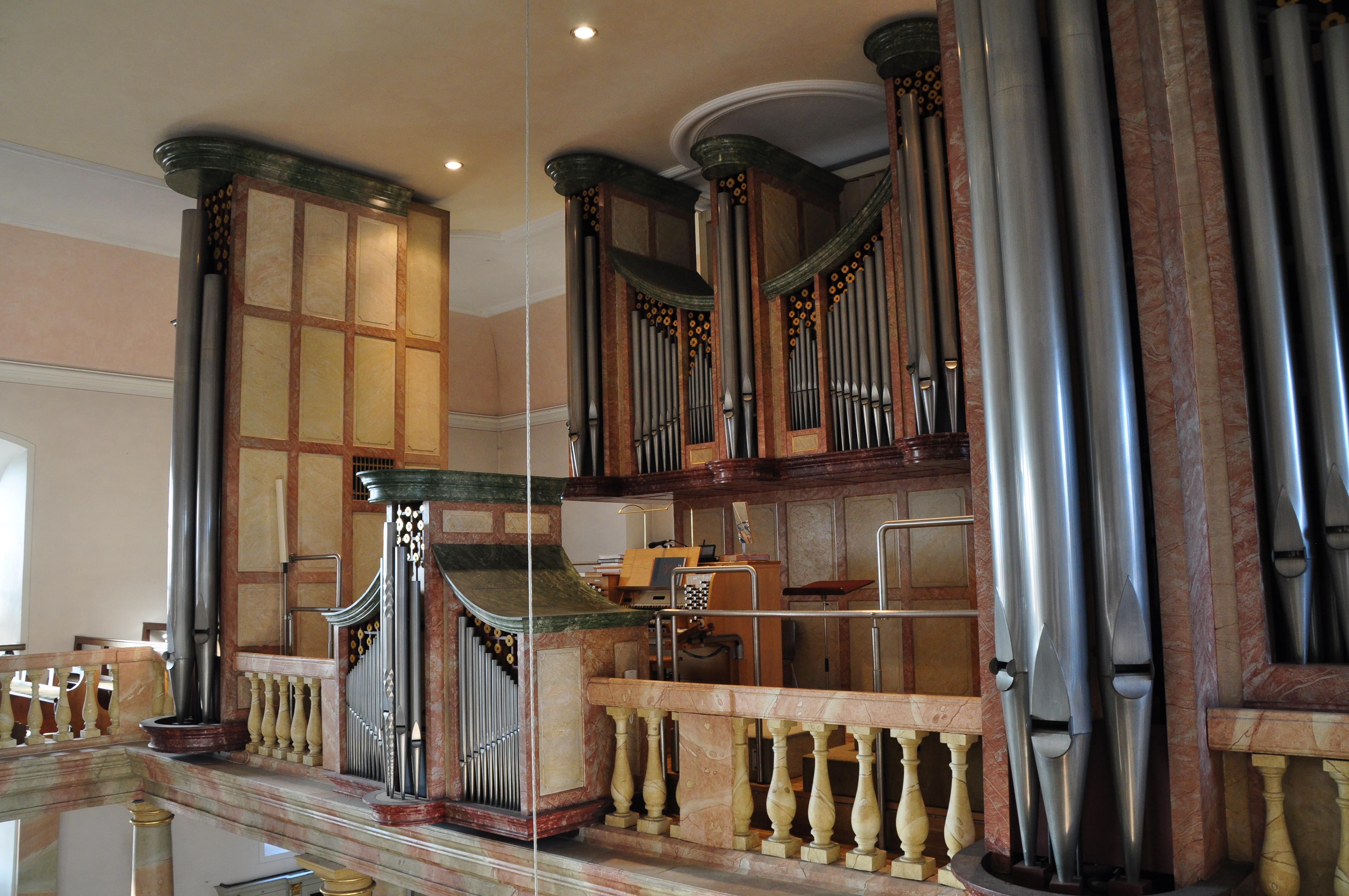 Beckerath-Orgel, Katholische Pfarrkirche St. Maria Himmelfahrt Herxheim